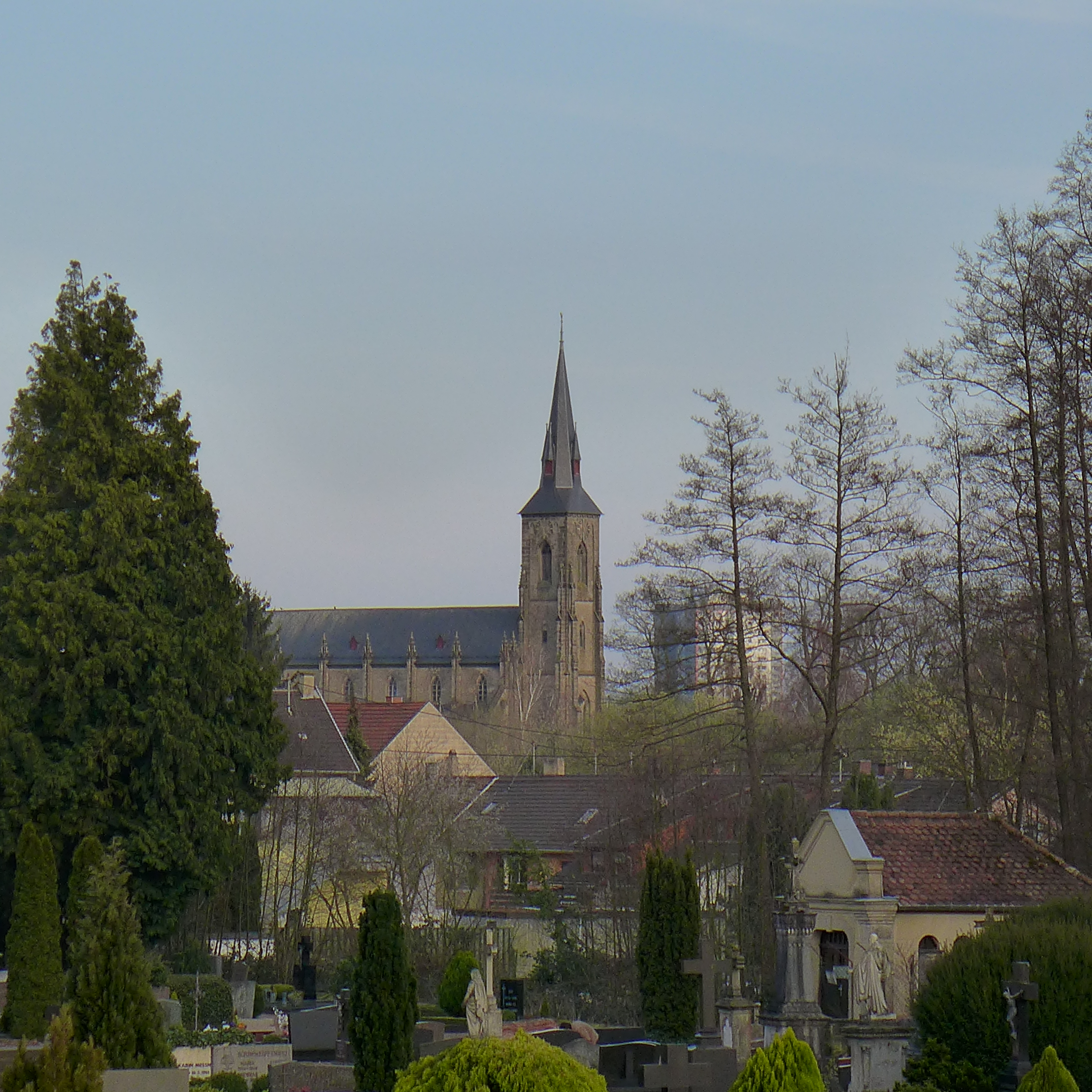 St. Katharina (Wallerfangen), Blick zur Kirche vom Friedhof aus